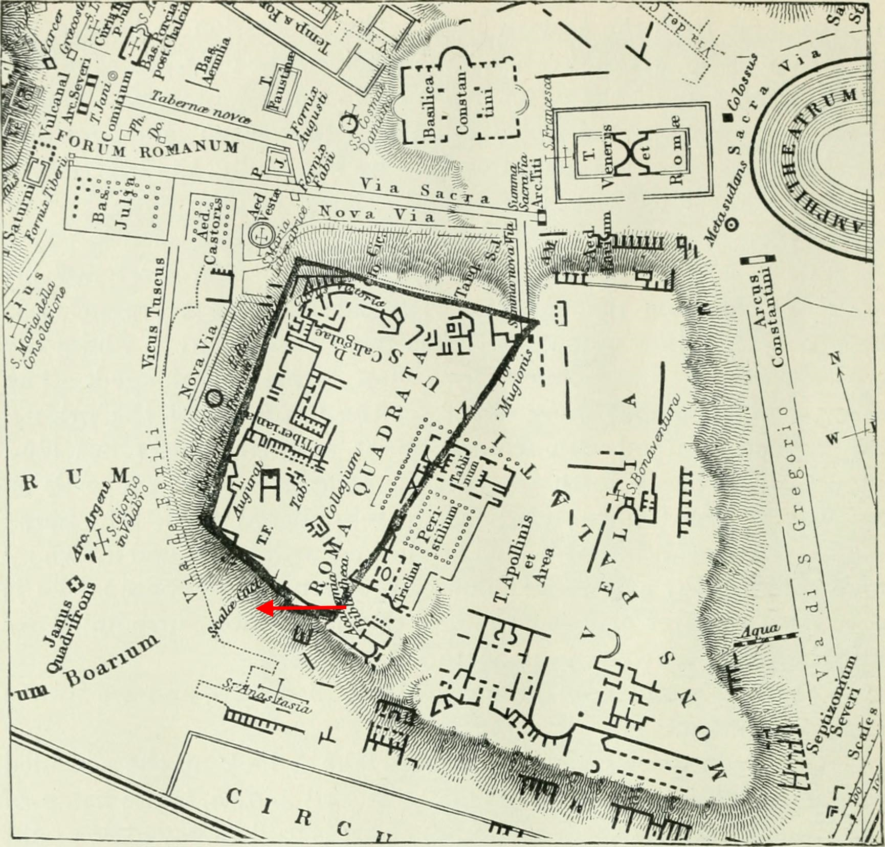 Pianta del Palatino